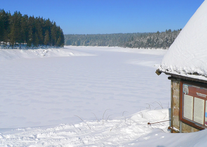 Oderteich im Winter mit Schnee- und Eisdecke, aufgenommen von der Staumauer